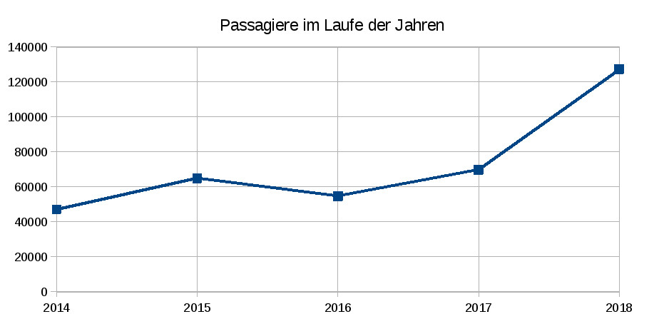 Entwicklung der Passagierzahlen am Flughafen Kassel-Calden